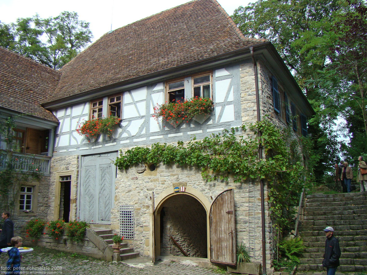 Schloss Oedheim, Nordostbau – am Tag des offenen Denkmals 2008